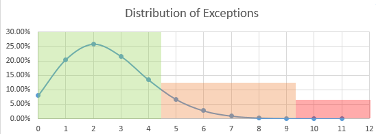 Nombre d'exception d'un backtesting de VaR 1D sur 250 jours